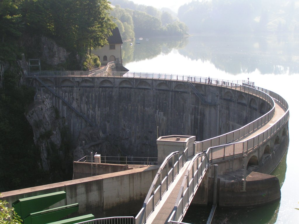 Bogenmauer des Montsalvens See Fotograf: Clément Dominik